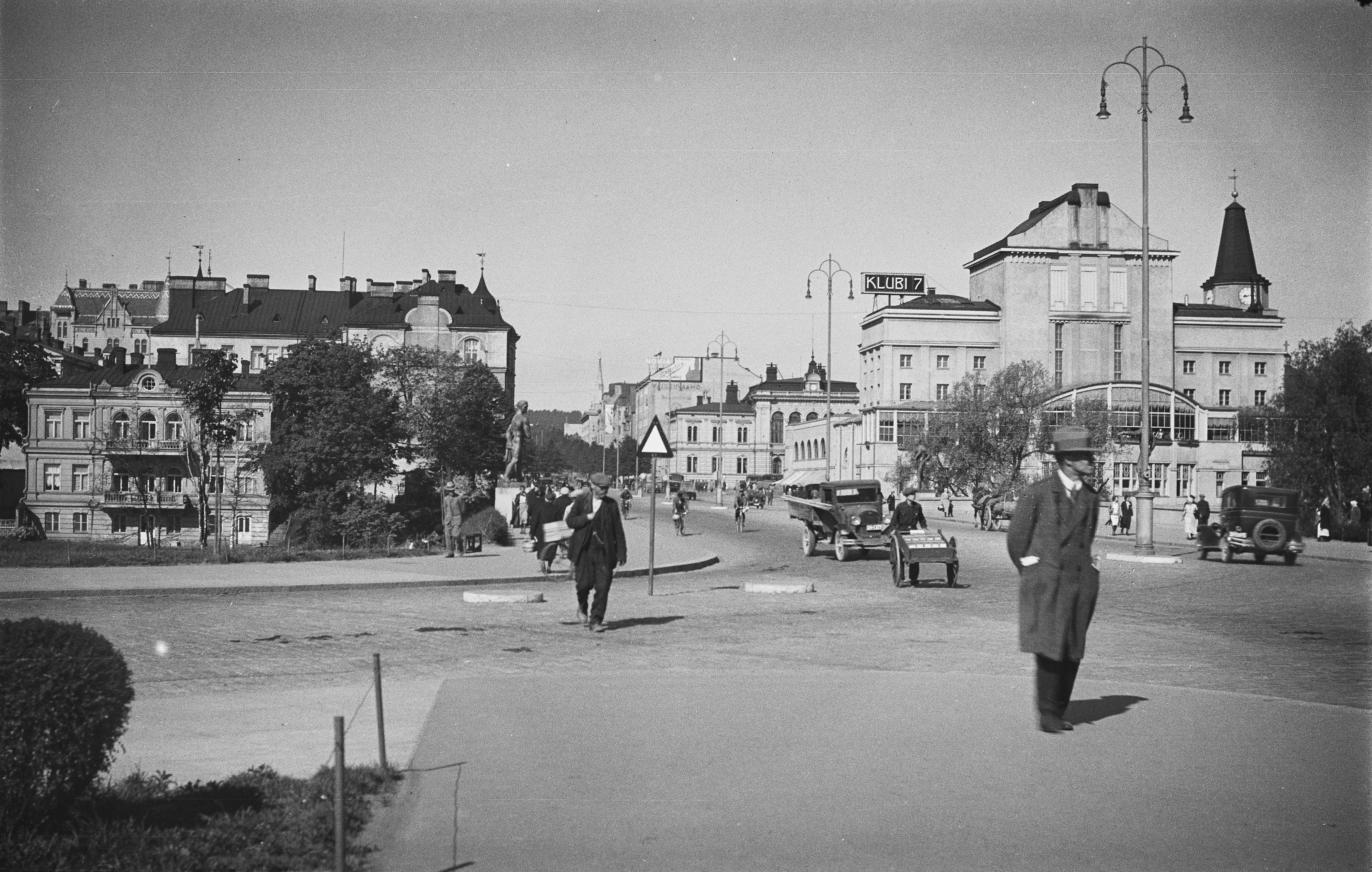 Valokuva on otettu Hämeensillan edustalta Hämeenkadun ja Hatanpään valtatien risteyksestä. Vasemmalla näkyy Sumeliuksen palatsi, oikealla Tampereen Teatteri.